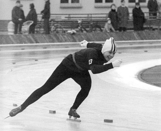 Ruth Schleiermacher Zentralbild Wendorf-29.11.69 Berlin: DDR-Eisschnellaufmeisterschaften im Mehrkampf auf der 400-m-Kunsteisbahn im Dynamo-Sportforum am 29. u. 30.11.69-Die 500-m-Weltrekordlerin Ruth Schleiermacher (SC Dynamo Berlin-Archivfoto) ist bei den Frauen die große Favoritin für den Mehrkampftitel. Abgebildete Personen: Schleiermacher, Ruth: Eisschnelläuferin, Olympiateilnehmerin 1968 und 1972, DDR